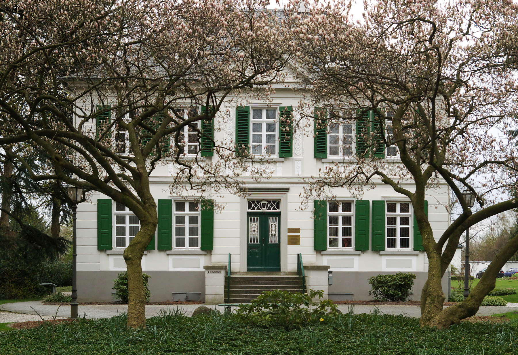 Haus Kirschheide in Solingen, Blick über den parkähnlichen Garten zum Haupteingang